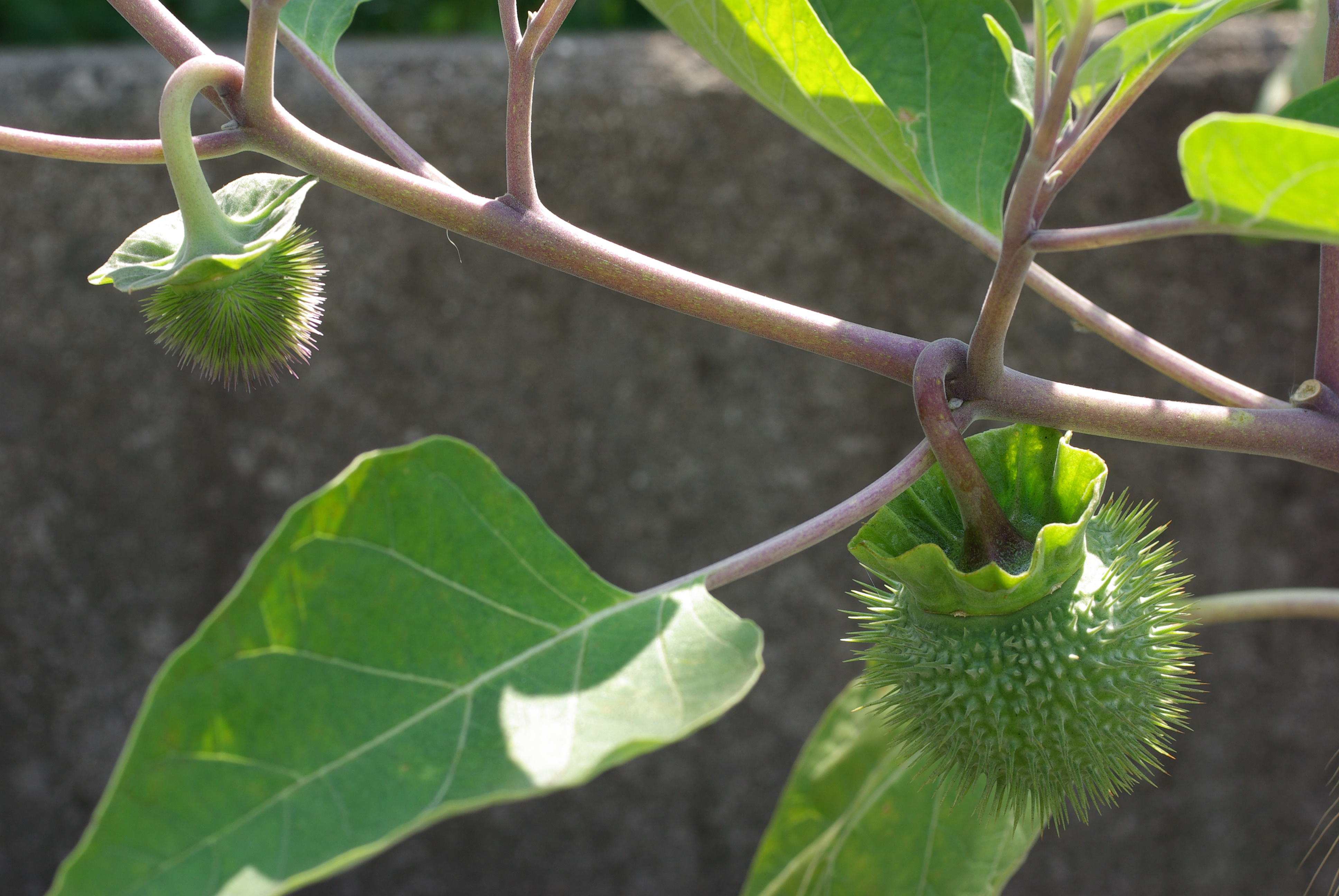 ケチョウセンアサガオの実。愛知県大府市